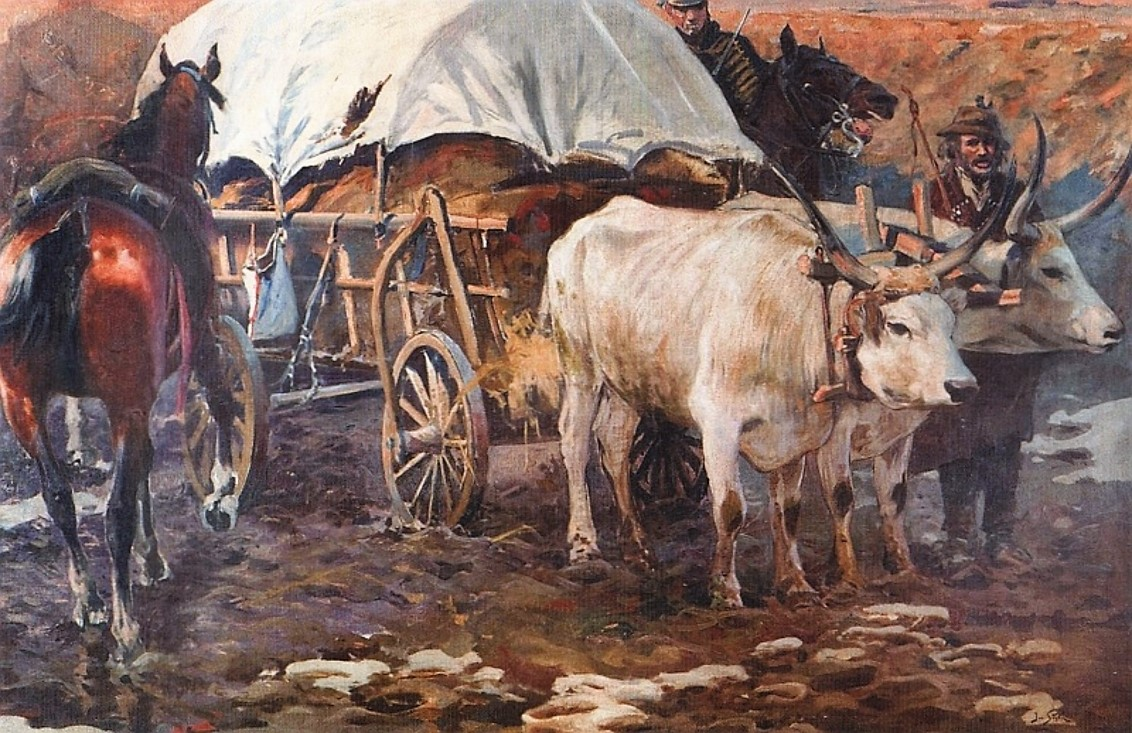 Panorama Siedmiogrodzka fragment